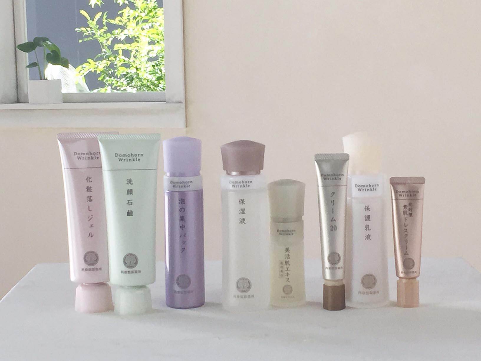 ドモホルンリンクルの商品画像8点です。